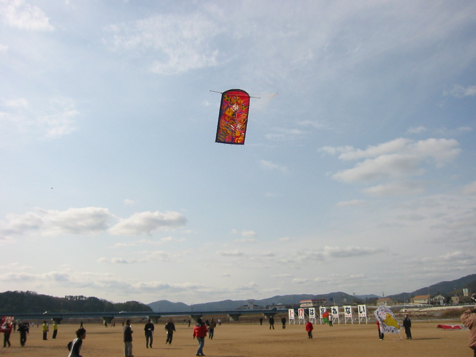 童謡の里龍野凧あげ祭り 四国の和凧、動くたび音がなる